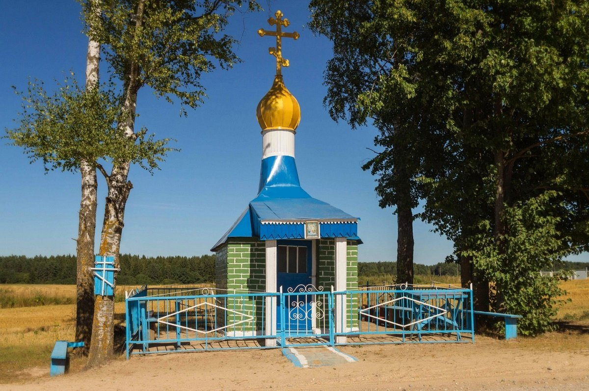 Варанова. Праваслаўная капліца